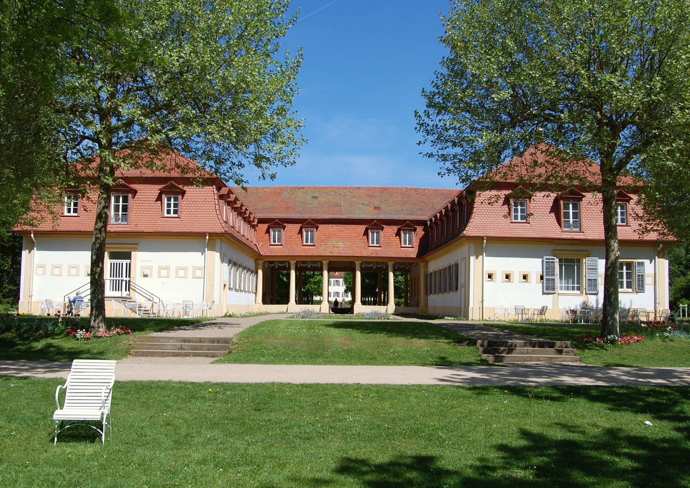 Rückseite des Brunnenbaues in Bad Bocklet